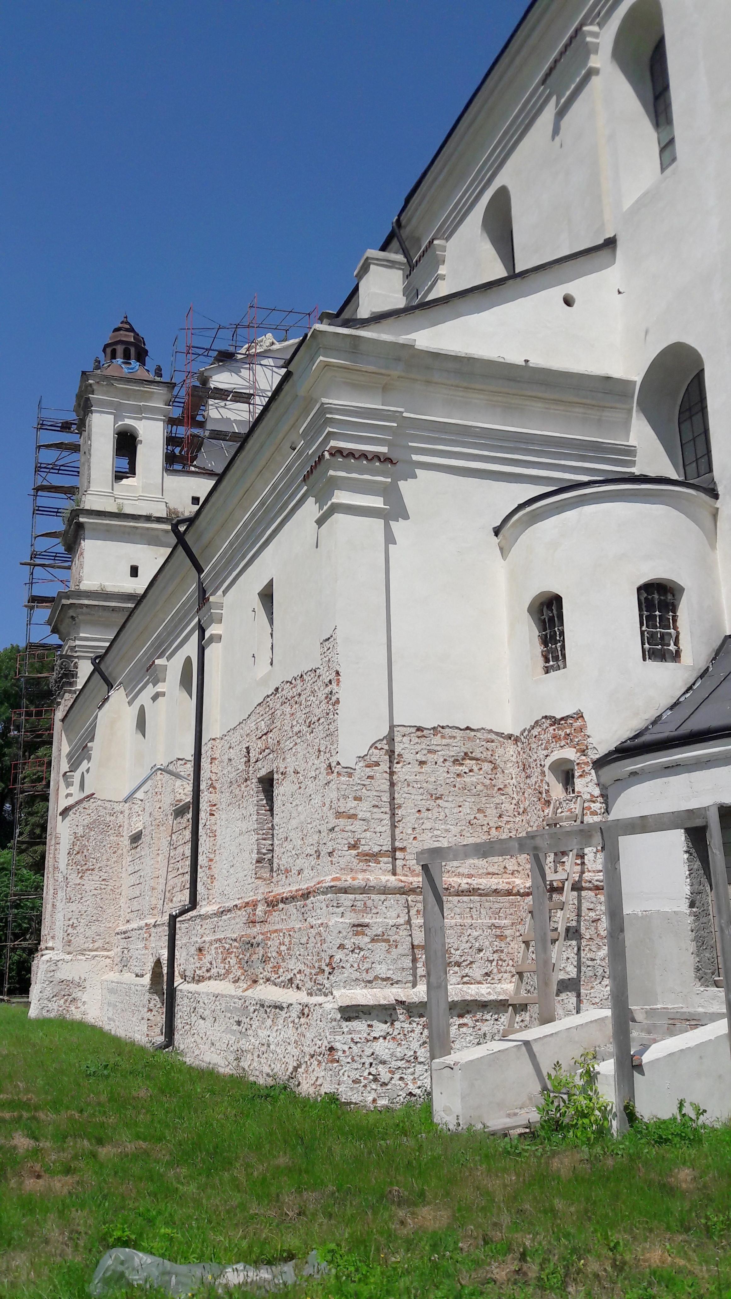 Olykos šv. Trejybės bažnyčios šoninė dalis